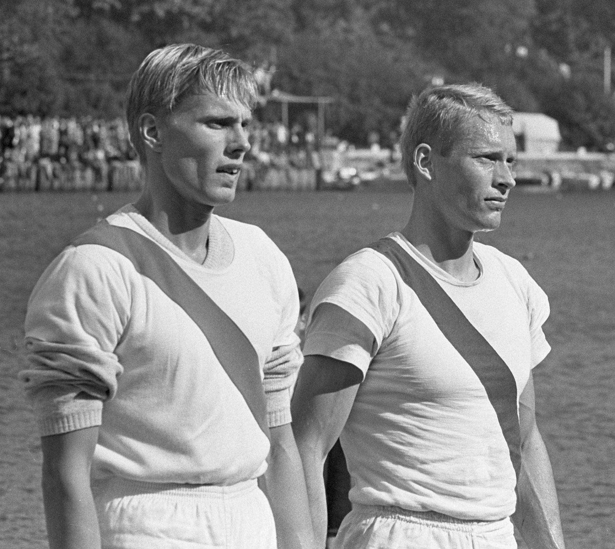 Europese Roeikampioenschappen te Duisburg, Deense twee zonder stuurman